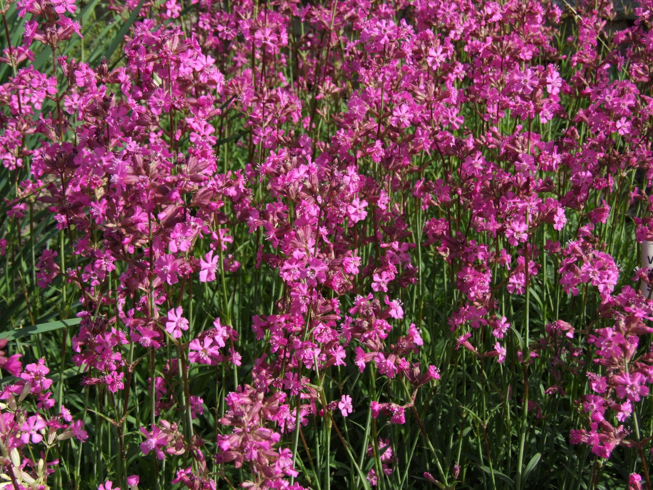 Viscaria vulgaris